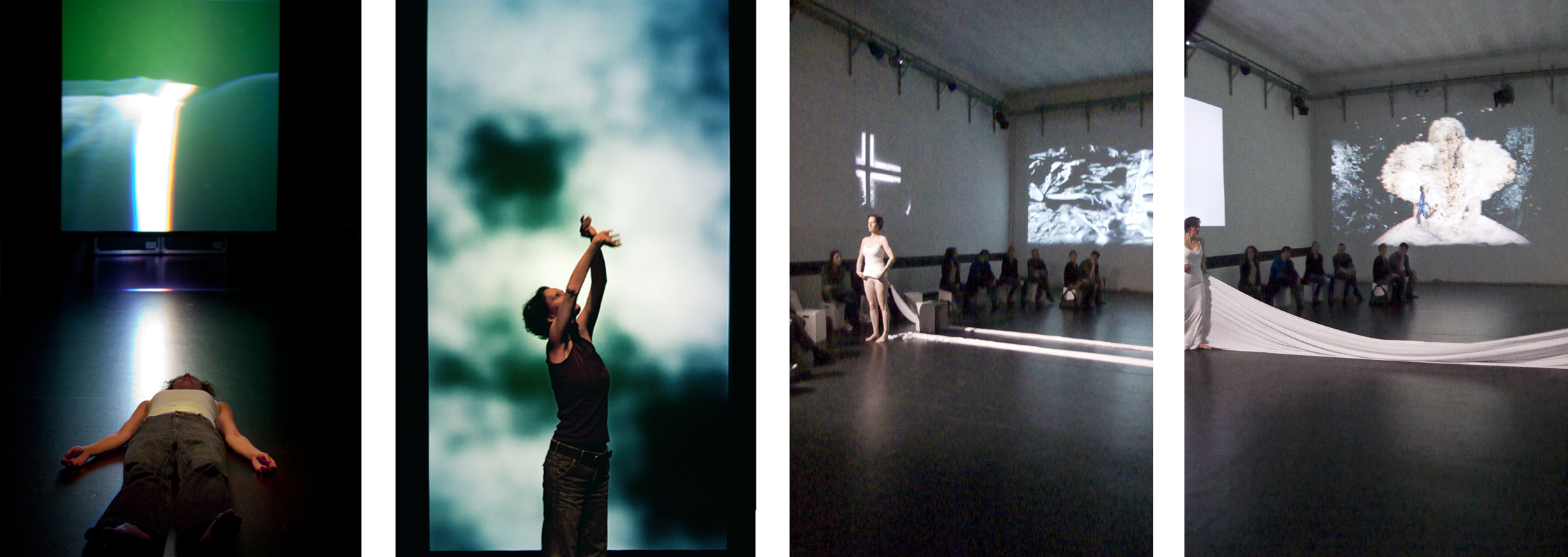 Dokumentation "… dein bezauberndes Lächeln" (2011) und "white" (2014)